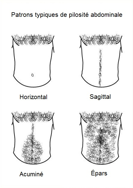 Patrons de pilosité abdominale (horizontal, sagittal, acuminé, épars).